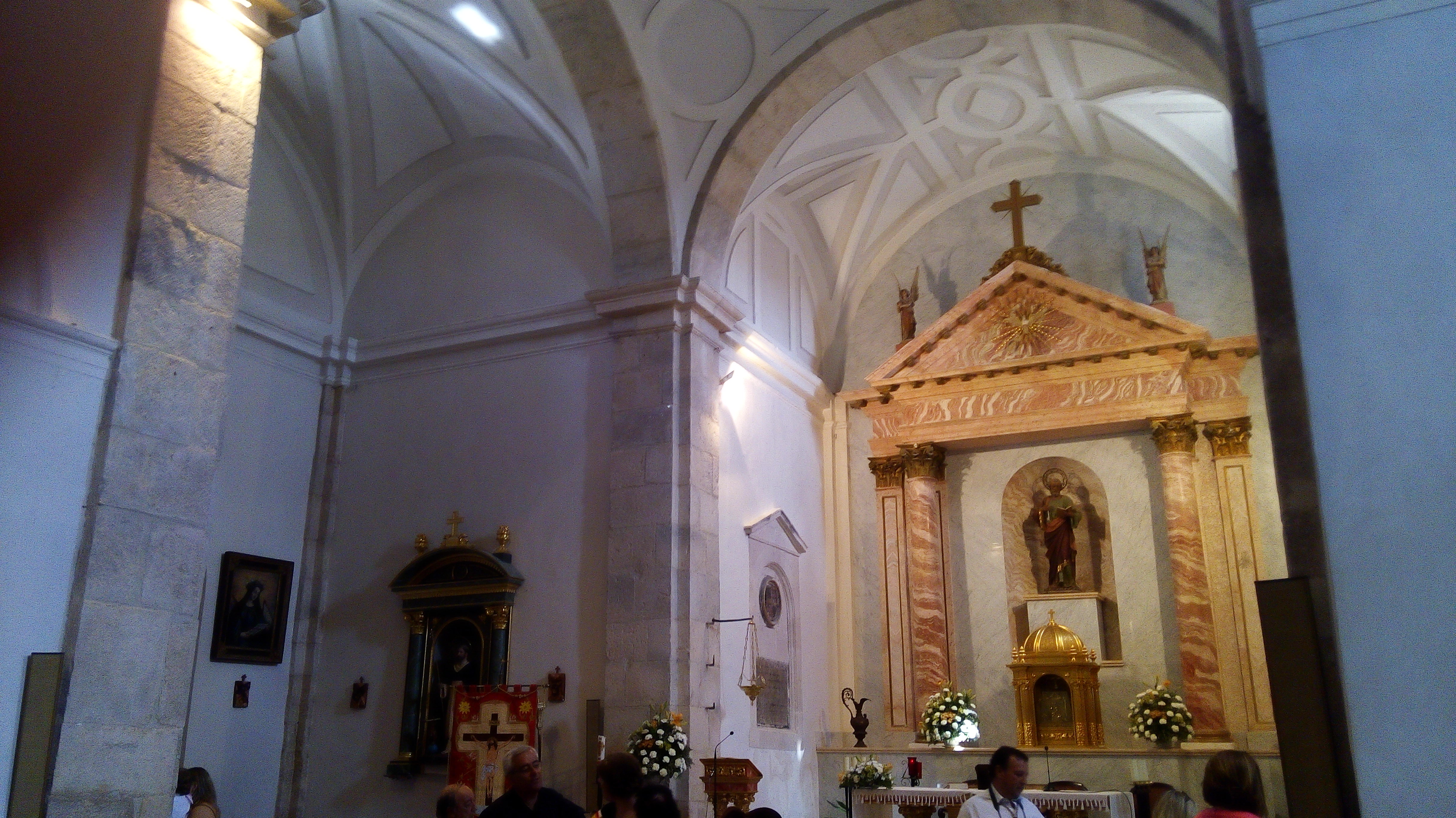 Interior de la Iglesia